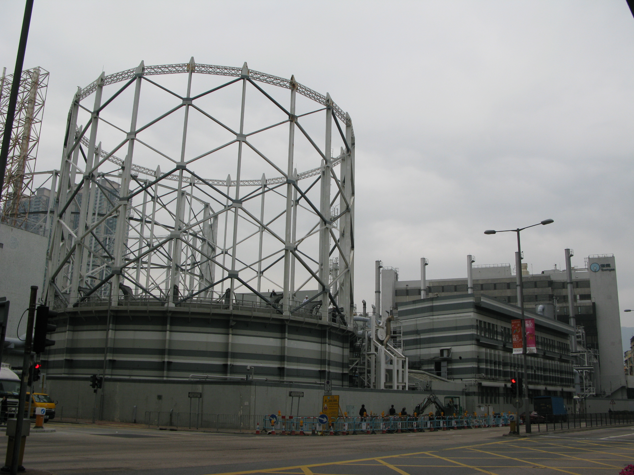 中文（香港）: 香港九龍土瓜灣中華煤氣中心